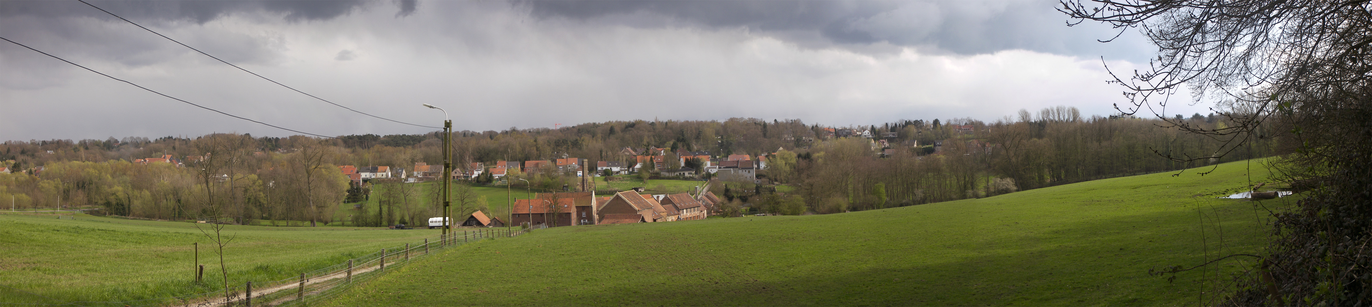 Zicht op de oude papiermolen 'Herisem' gezien vanuit het noorden.